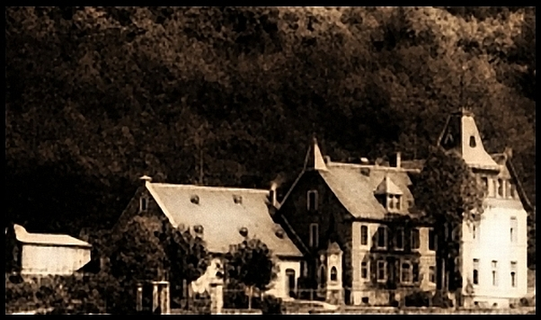 Schloss in Siedlinghausen, Abriss im Jahr 1966